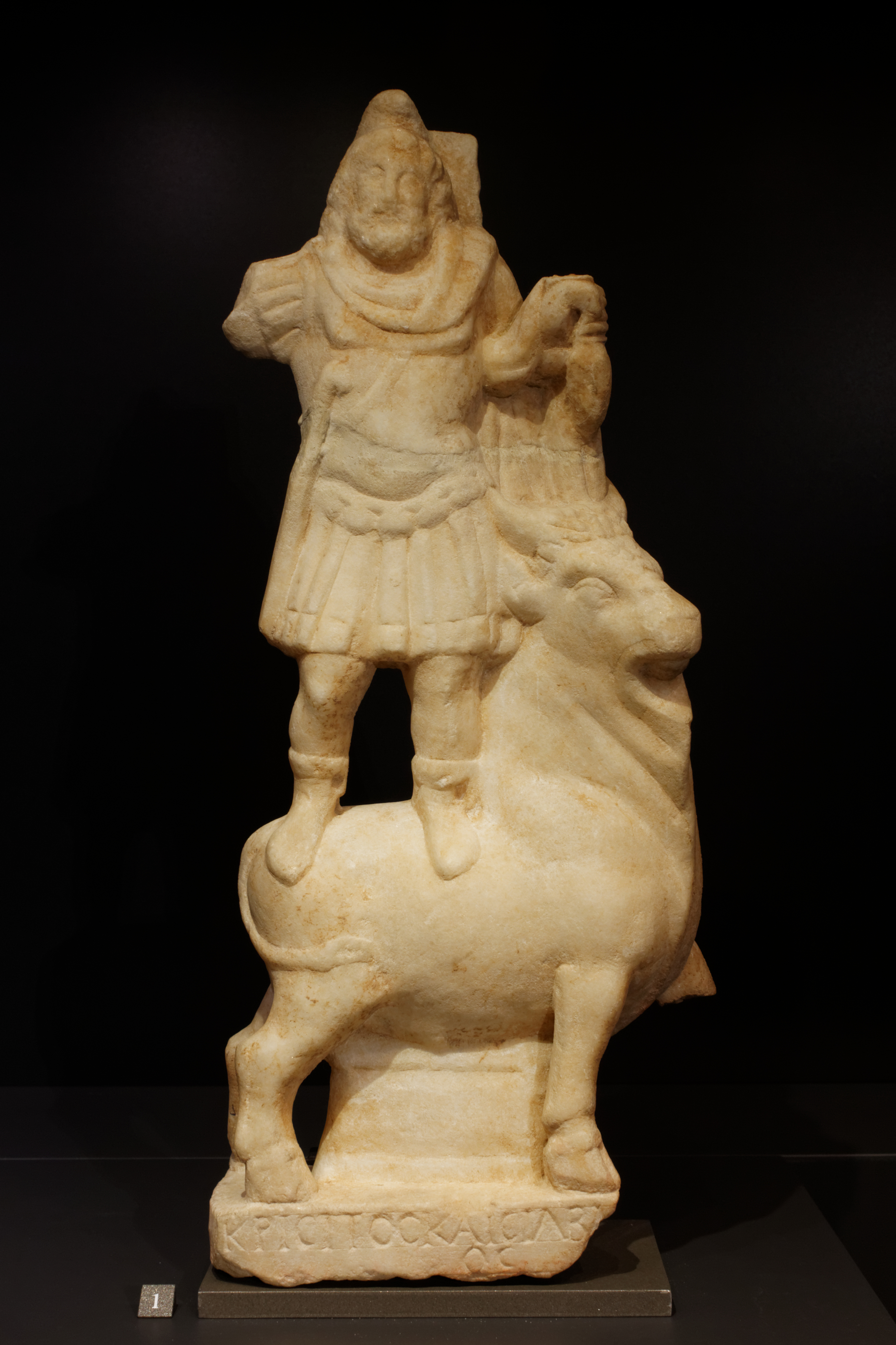 Comme l'ancien dieu de l'orage hittite, le Jupiter dolichénien est debout sur un taureau, de face, la main gauche tenant un foudre, et le bras droit levé. Mais sa tenue (cuirasse de cuir à lambrequins, manteau agrafé à l'épaule — le paludamentum) est celle des emprerurs romains, qui ont, comme lui, l'omnipotence, y compris sur l'armée. Son culte se diffuse largement dans toutes les provinces de l'Empire où la présence militaire est importante, notemment dans les provinces danubiennes.